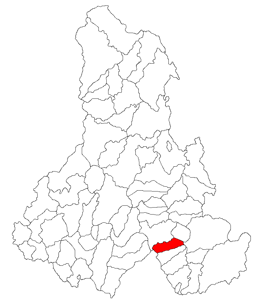 Categorie:Hărţi ale judeţului Harghita Contents 1 Licensing 2 Sursă 3 Licensing 4 Original upload log Licensing Sursă ro::Imagine:Harta_jud_Harghita.png